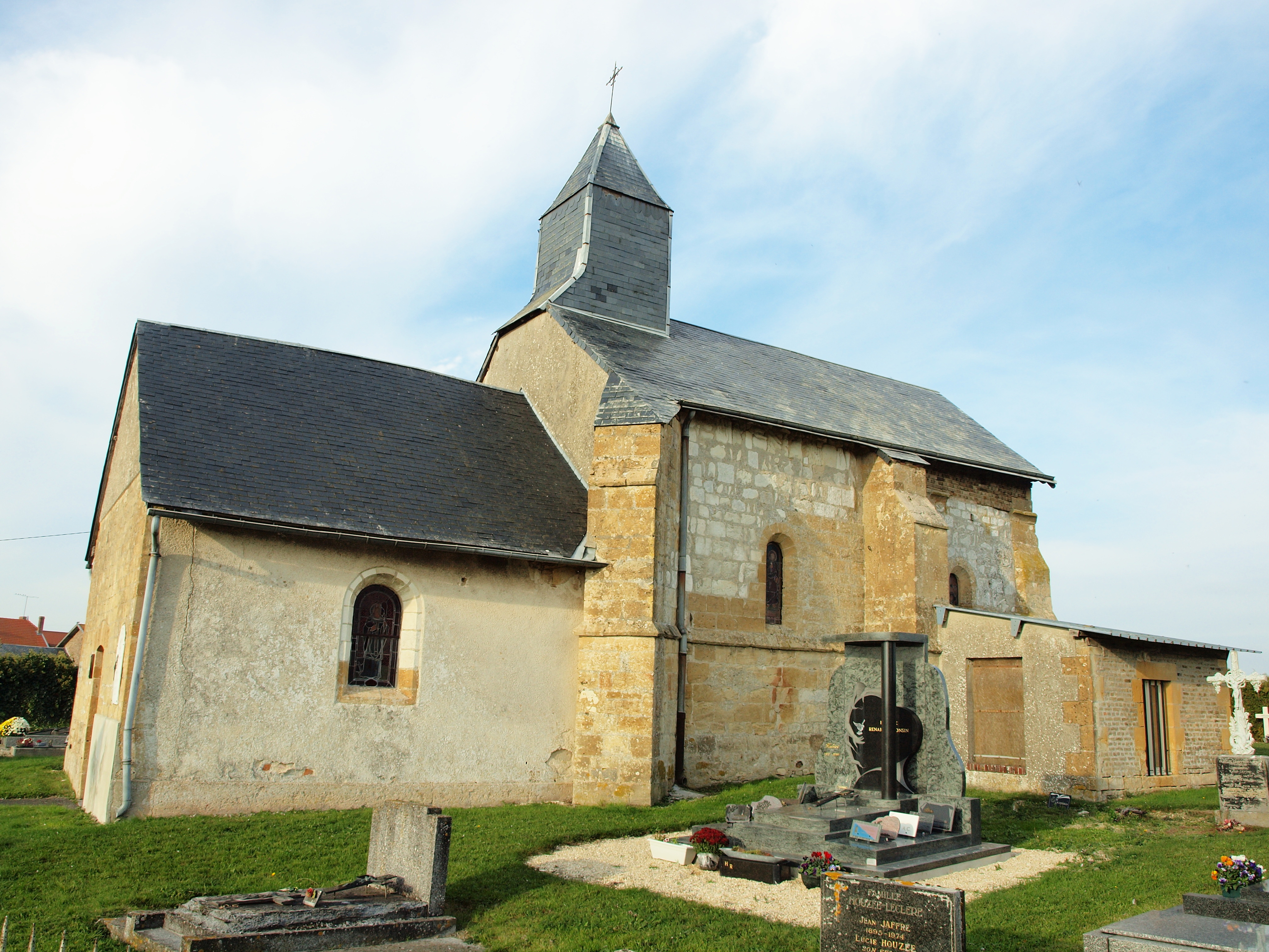 Dricourt (Ardennes, France)